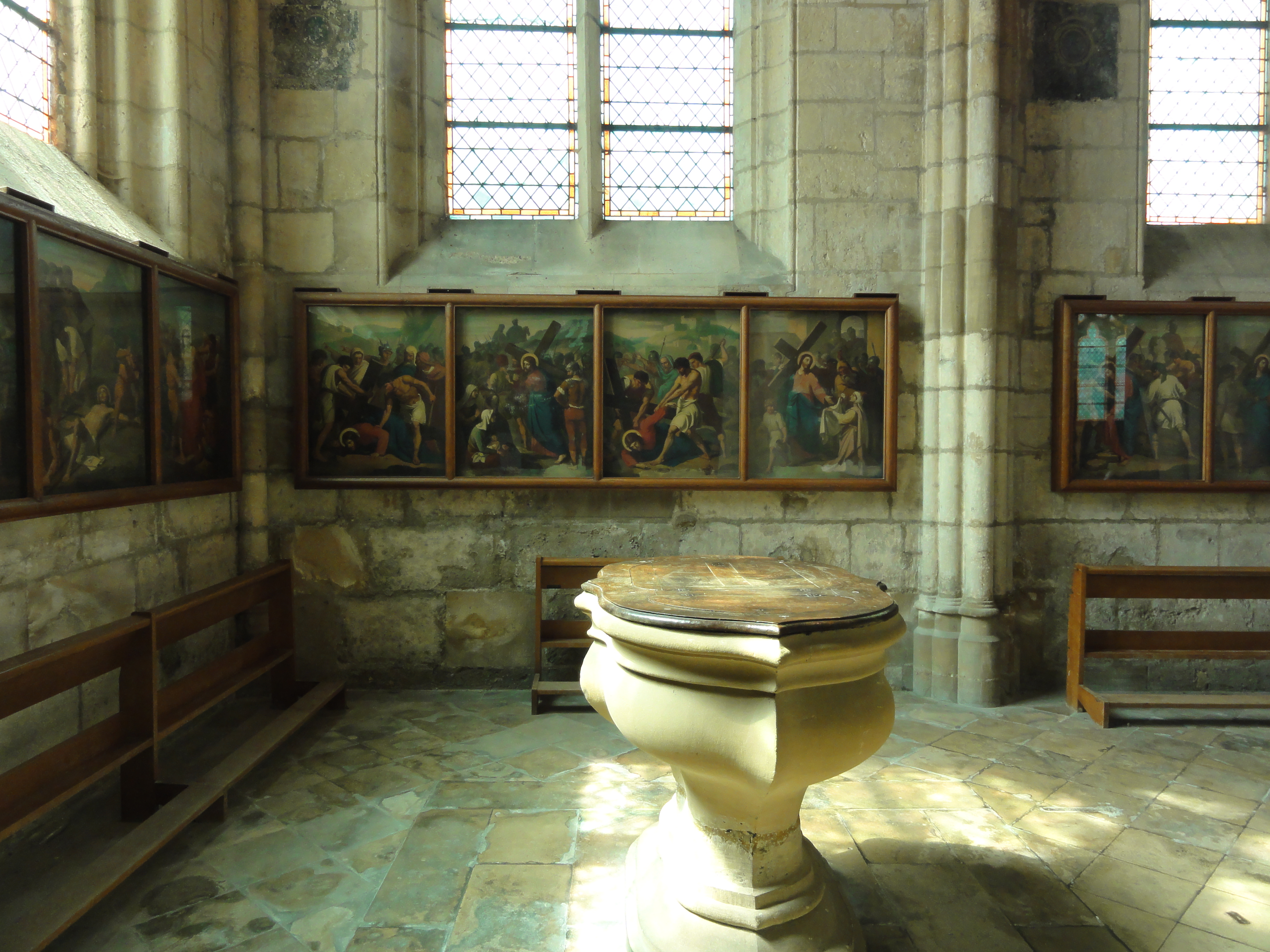 intérieur de l'Église Notre-Dame de Chambly